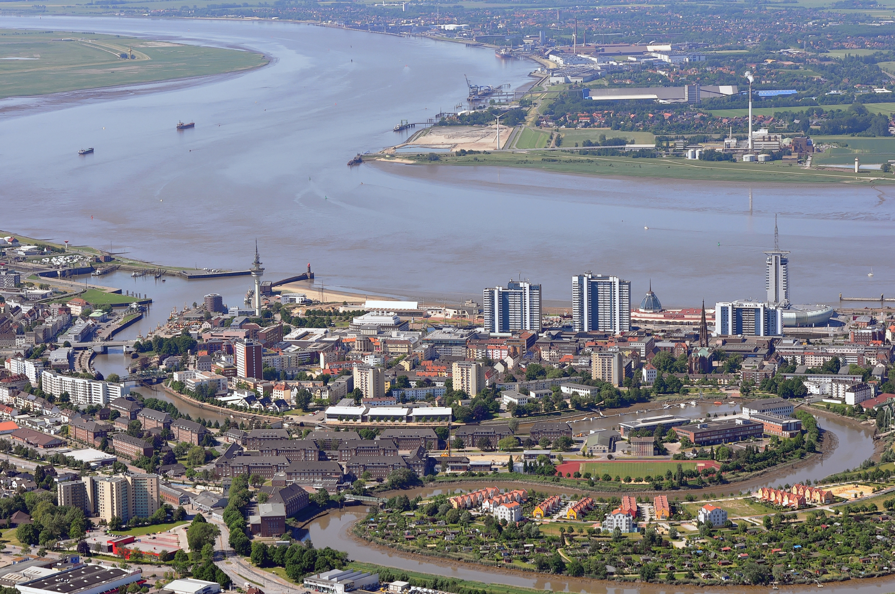 Luftbilder von der Nordseeküste 2012-05: Bremerhaven, Geestemündung in die Weser